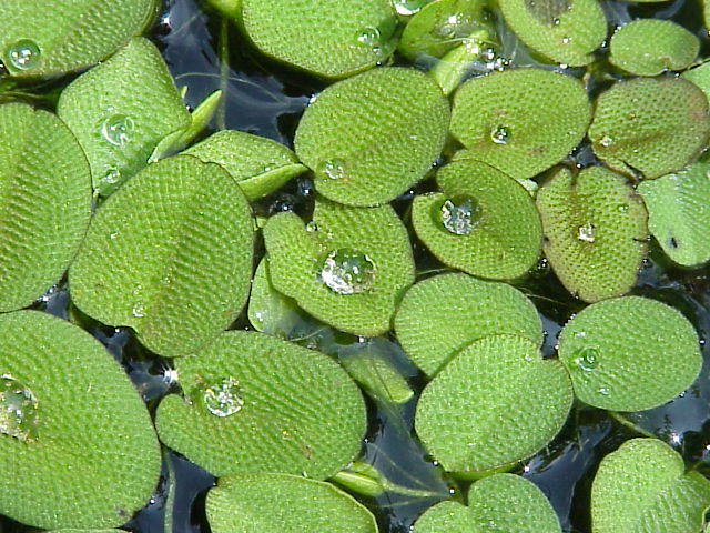 Species: Salvinia minima. Family: Salviniaceae Image No. 2